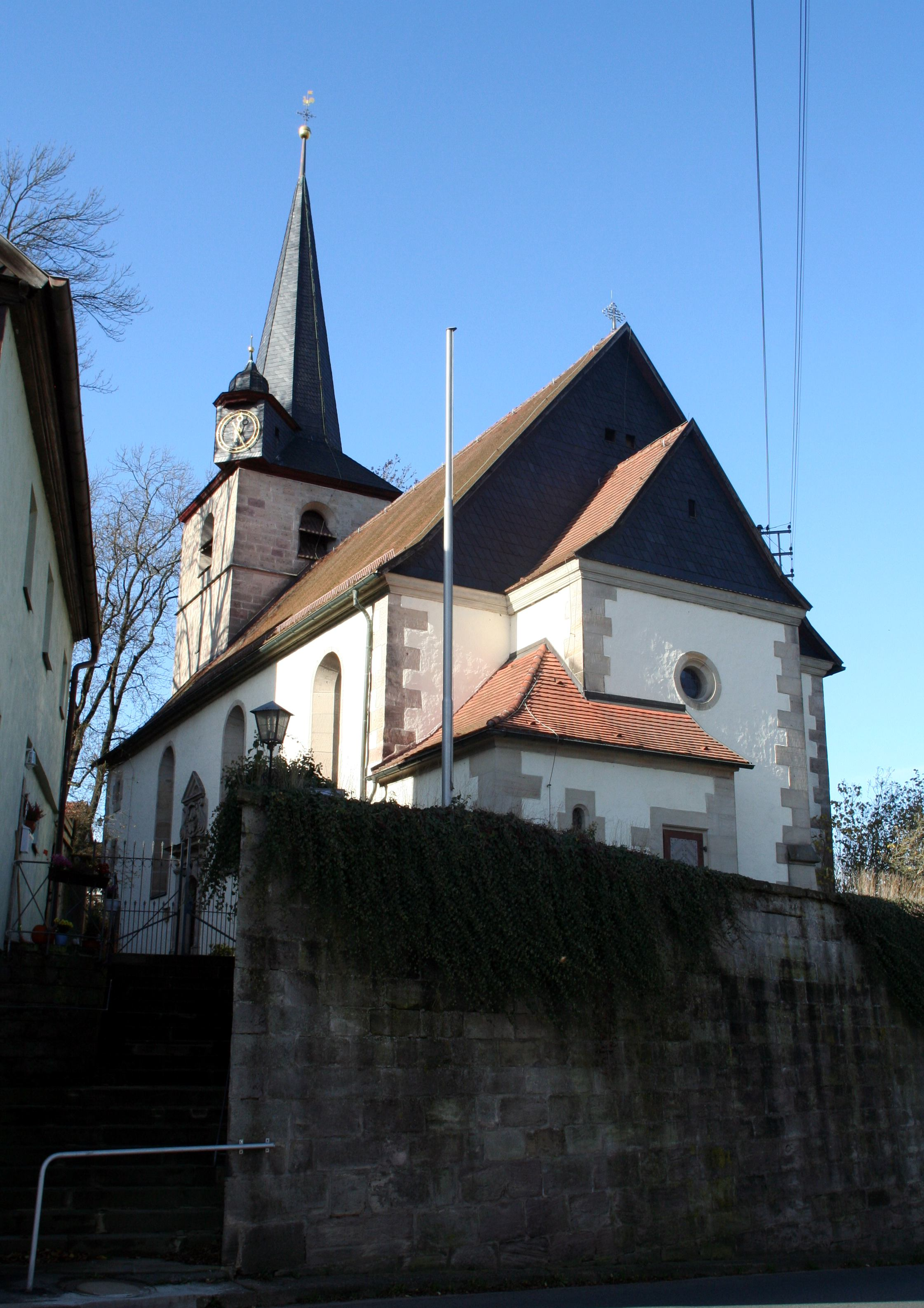 Evangelische Kirche in Weißenbrunn in Oberfranken Landkreis Kronach